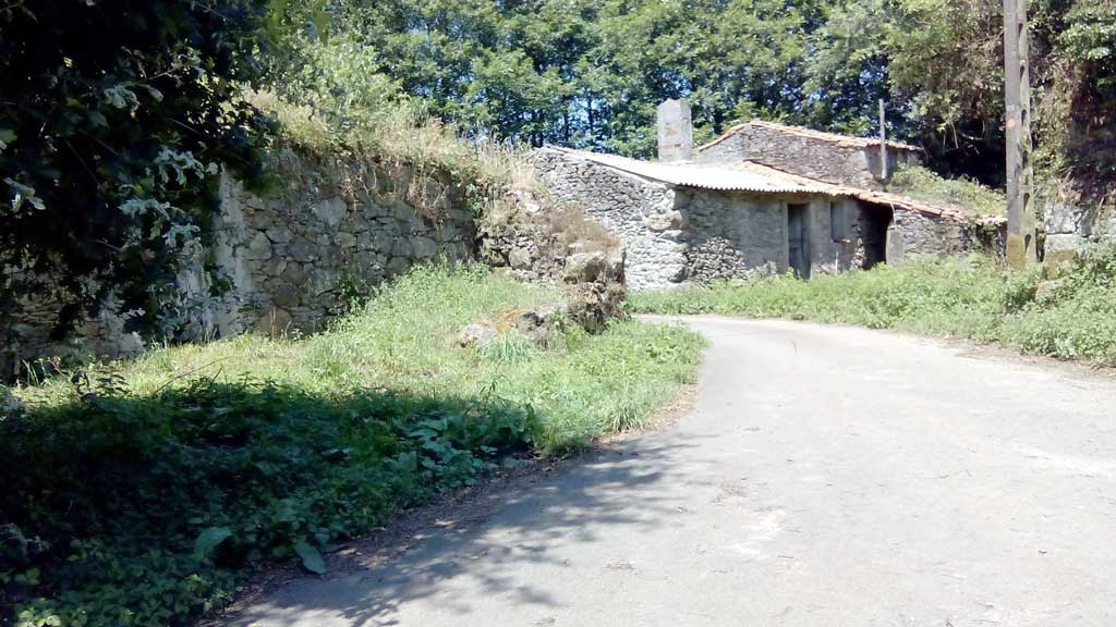 Vista do Vilarvello, Curtis.